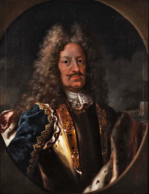 Porträtt av Magnus Stenbock. Oljemålning på duk inom förgylld ram med bladornamenterade hörn. Tavlan har tillhört ätten von Rosen, Hedenlunda, Vadsbro.